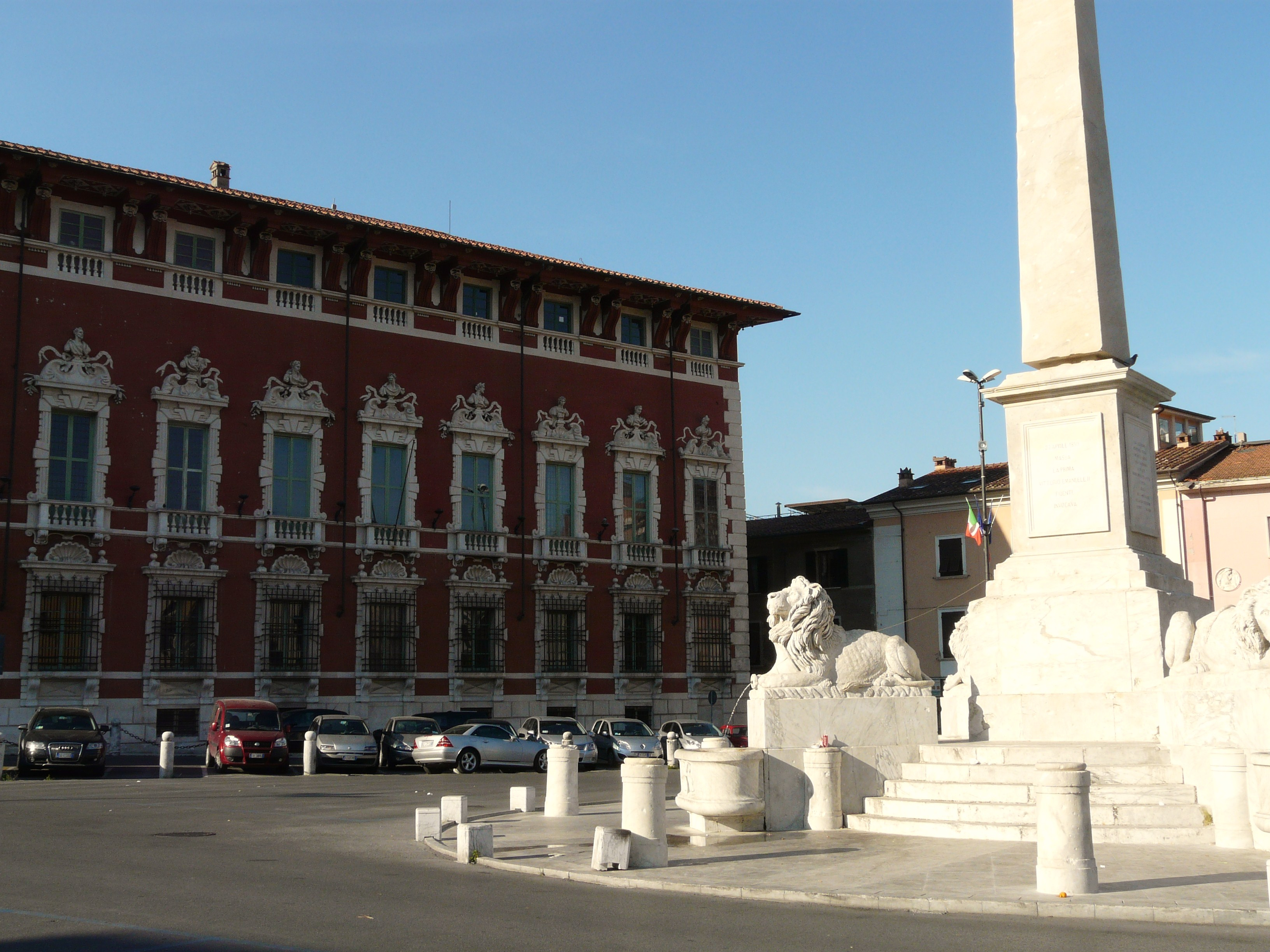 Palazzo Ducale di Massa, Toscana, Italia